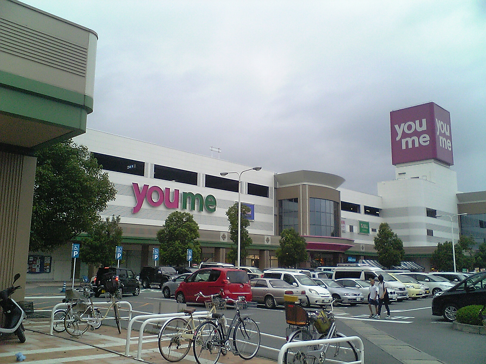 ゆめタウン久留米（福岡県久留米市）